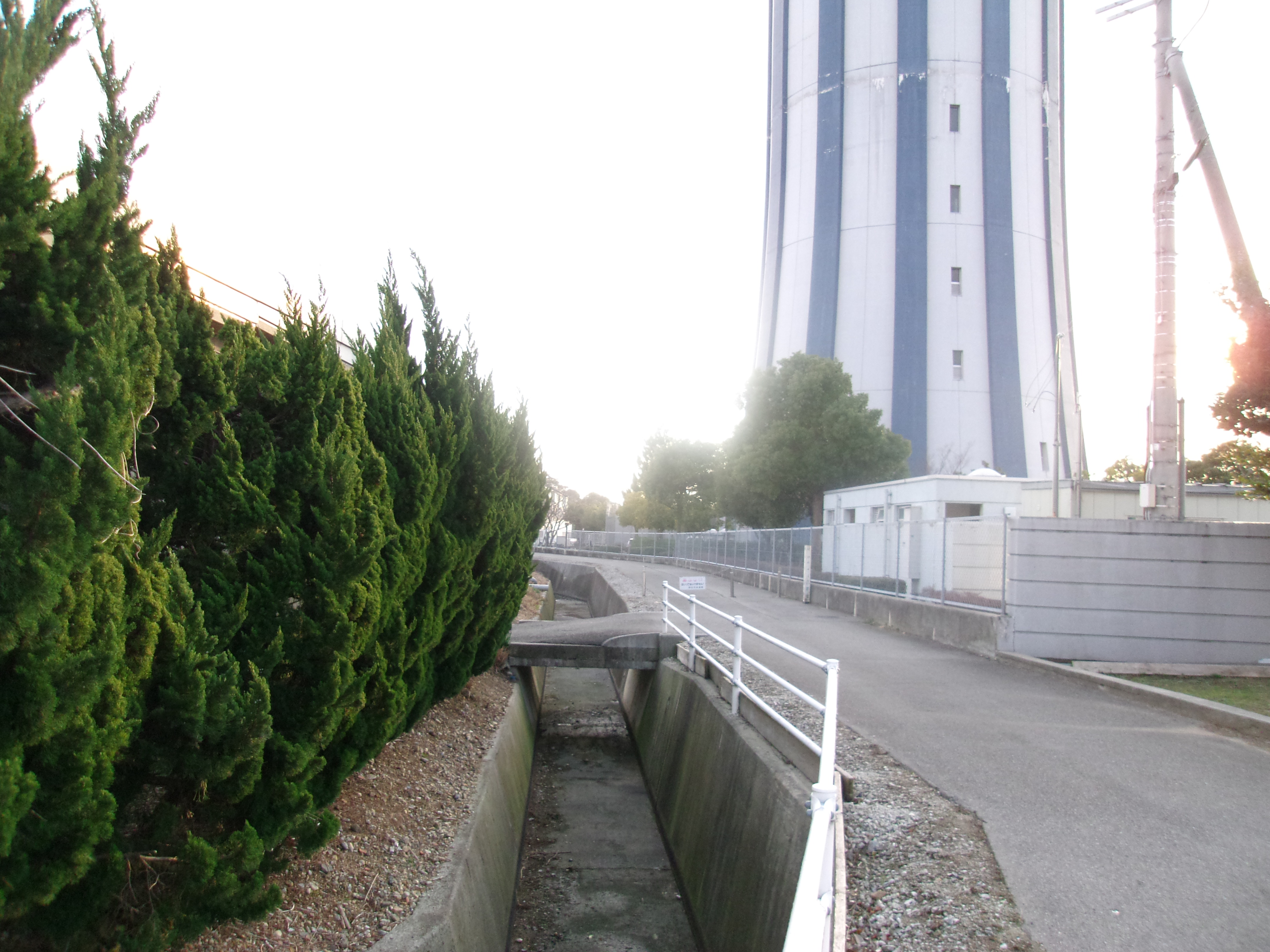 寛政12年（1800年）に瀬戸川から分岐して造られた庄内用水（明石市魚住浄水場脇）。現在はコンクリート護岸に整備されている。